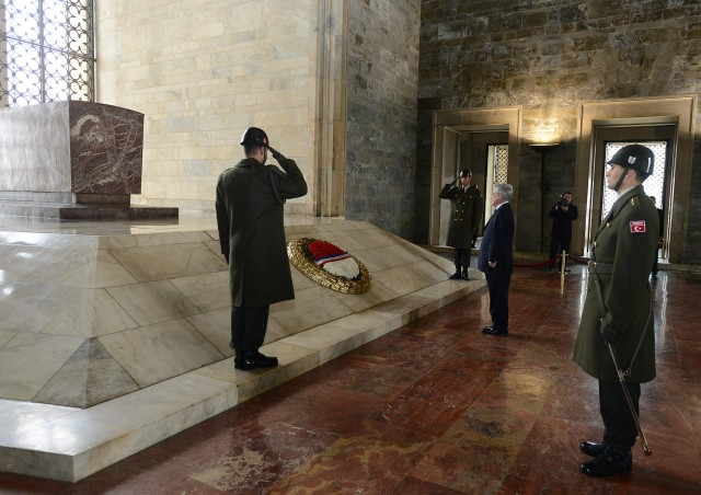 President Sebastián Piñera at Ataturk´s grave in Ankara, Turkey